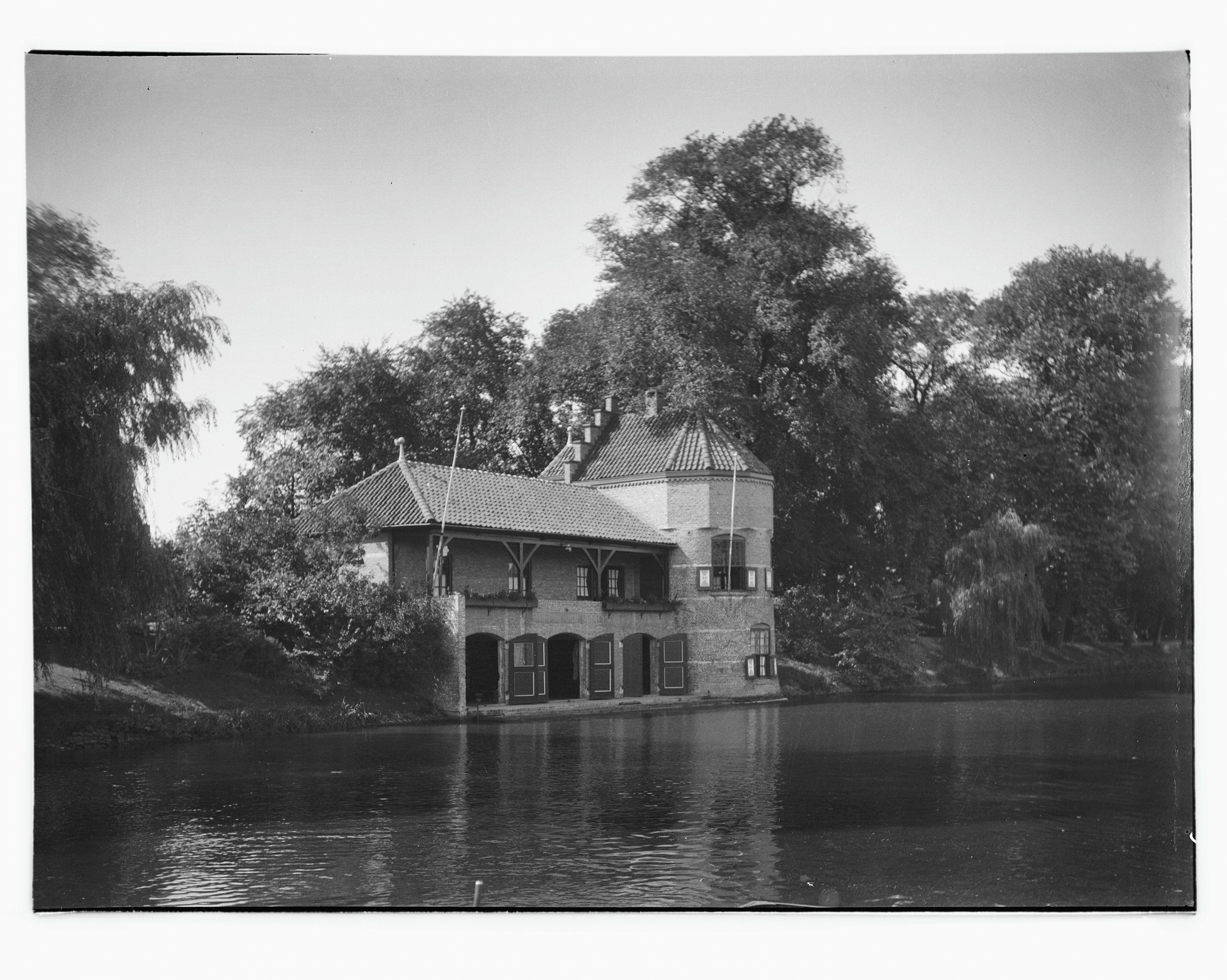 Wallen en Torens: Huibrechtstoren Oostplantsoen 40, gevel